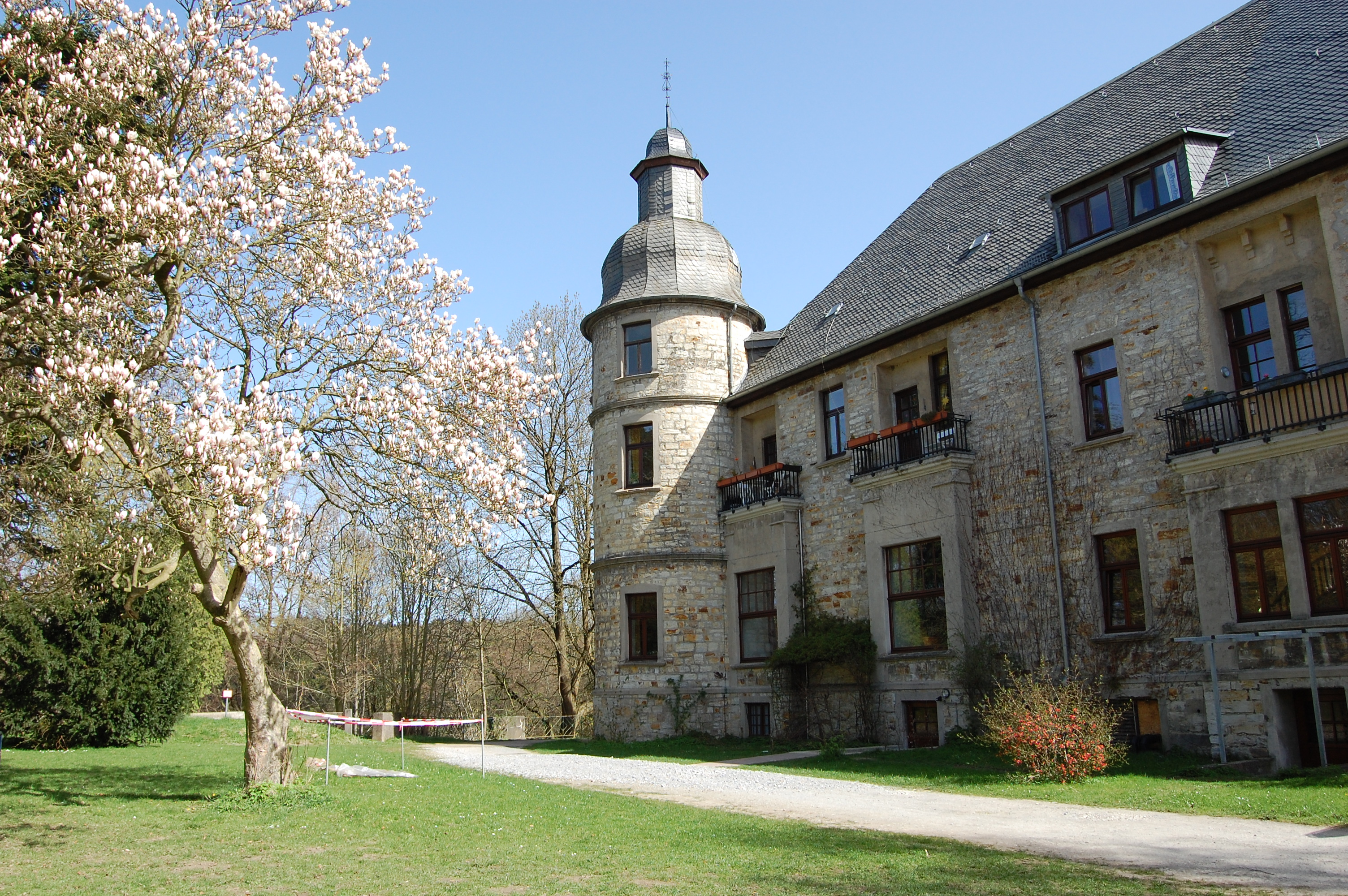 Hauptgebäude von Schloss Hamborn in Kirchborchen, Kreis Paderborn, am Rennweg Arnsberger Wald